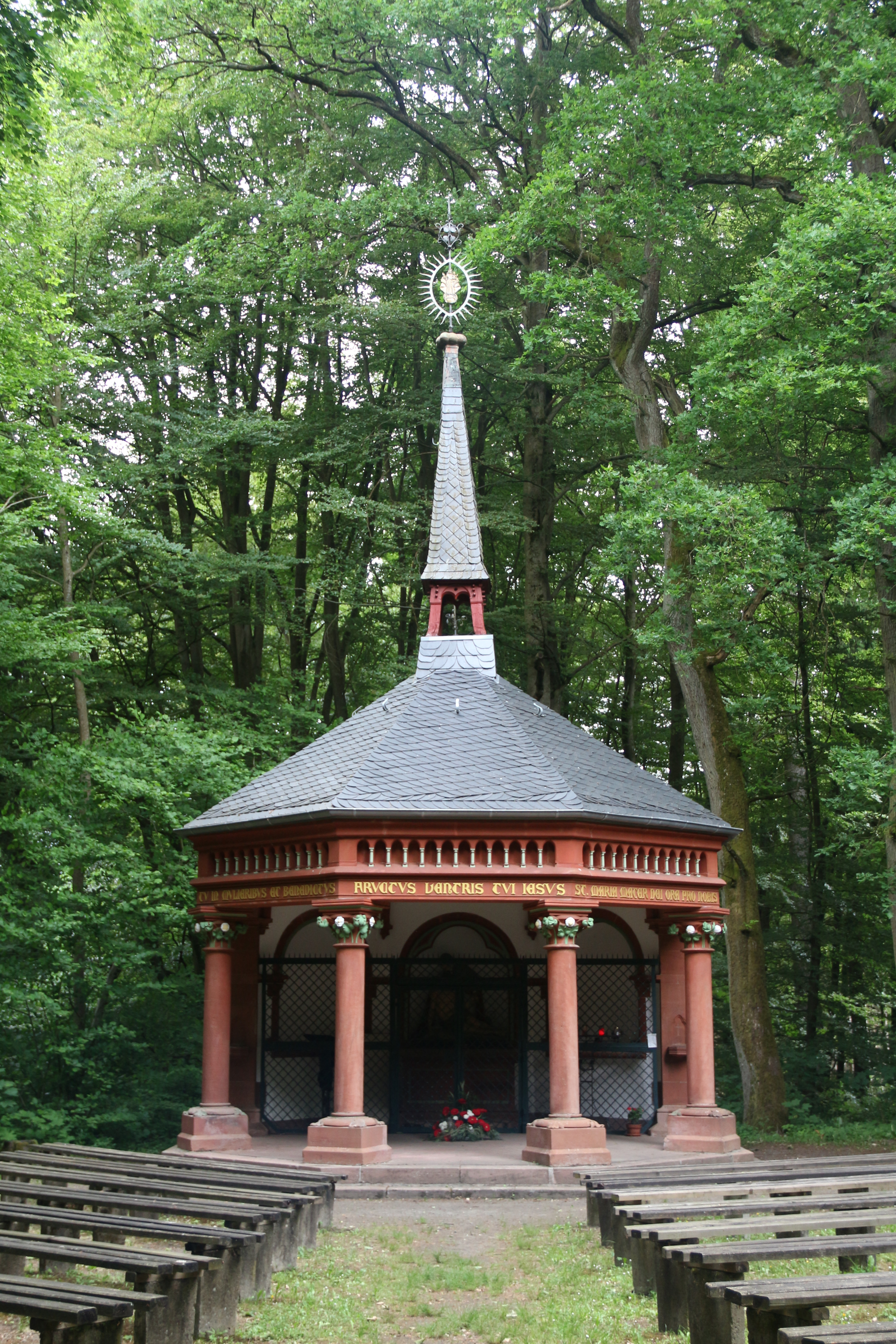 Forstkapelle im Herrenwald